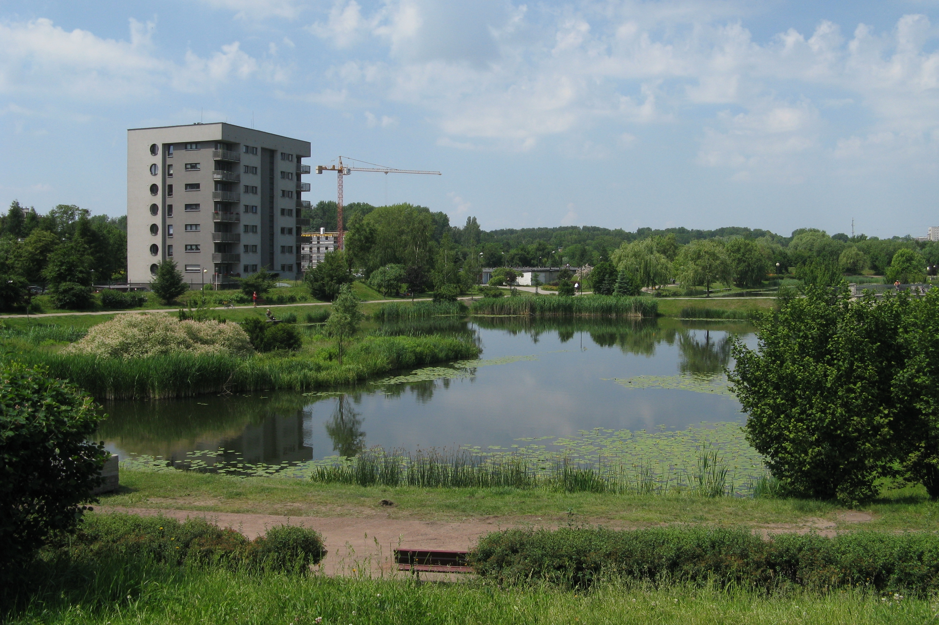 staw Amelung w Chorzowie, widok od wschodu z lewej blok przy ul. Sztygarskiej 12